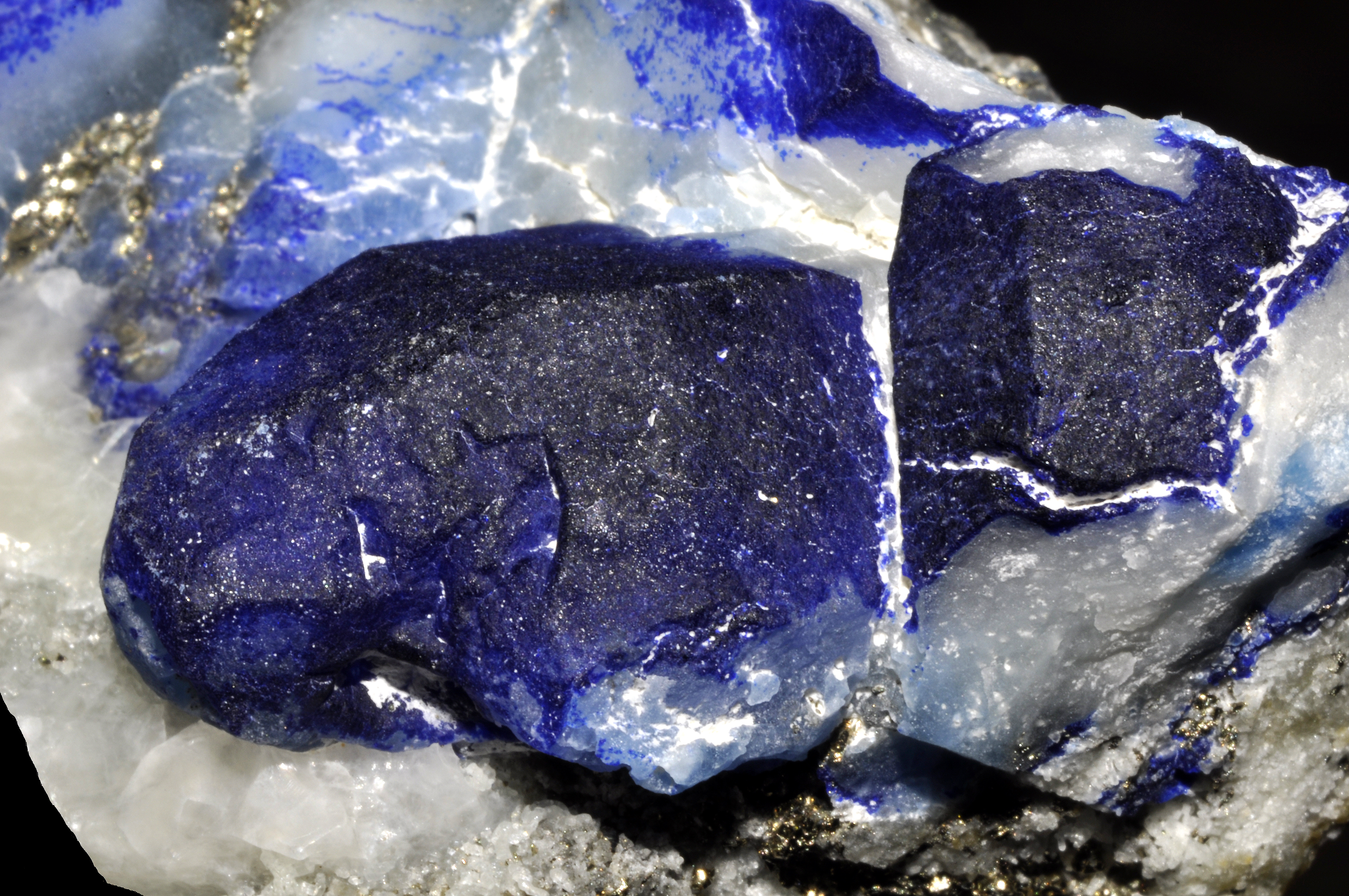 afghanite, pyrite, calcite : Sar-e-Sang (Sar Sang ; Sary Sang), Koksha Valley (Kokscha Valley ; Kokcha Valley), Khash & Kuran Wa Munjan Districts, Badakhshan Province (Badakshan Province ; Badahsan Province), Afghanistan